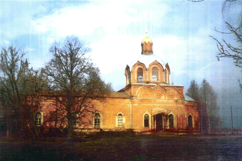 Церковь Симеона Столпника в селе Семион Кораблинского района Рязанской области (ранее - село Симеон ряжского уезда Рязанской губернии).